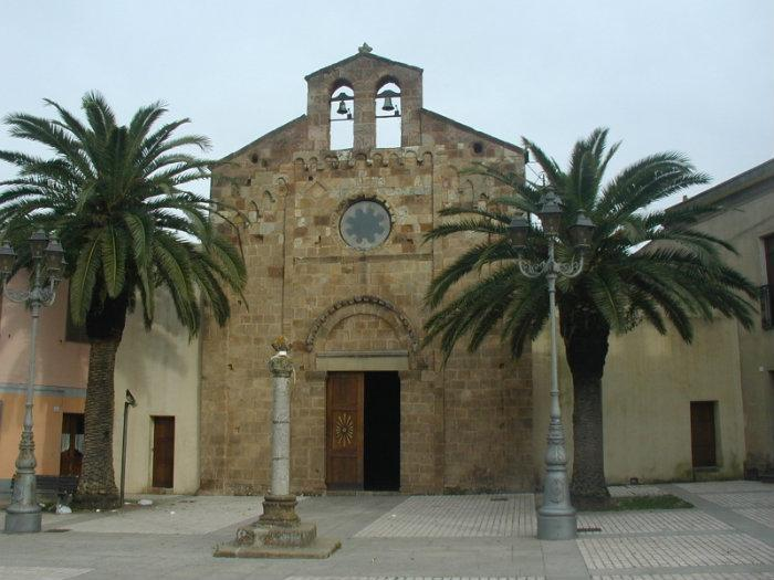 Chiesa di Nostra Signora del Pilar, Villamassargia